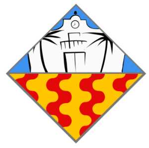 Escut de Saifores (no aprovat oficialment) Creat segons les preferències dels/les Saiforins.